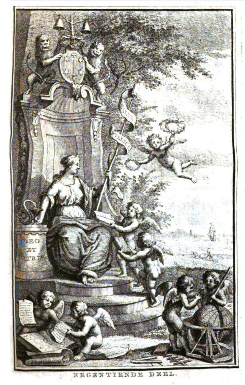 Illustratie in Verh. Hol. Maats. der Weten. Haarlem 1779